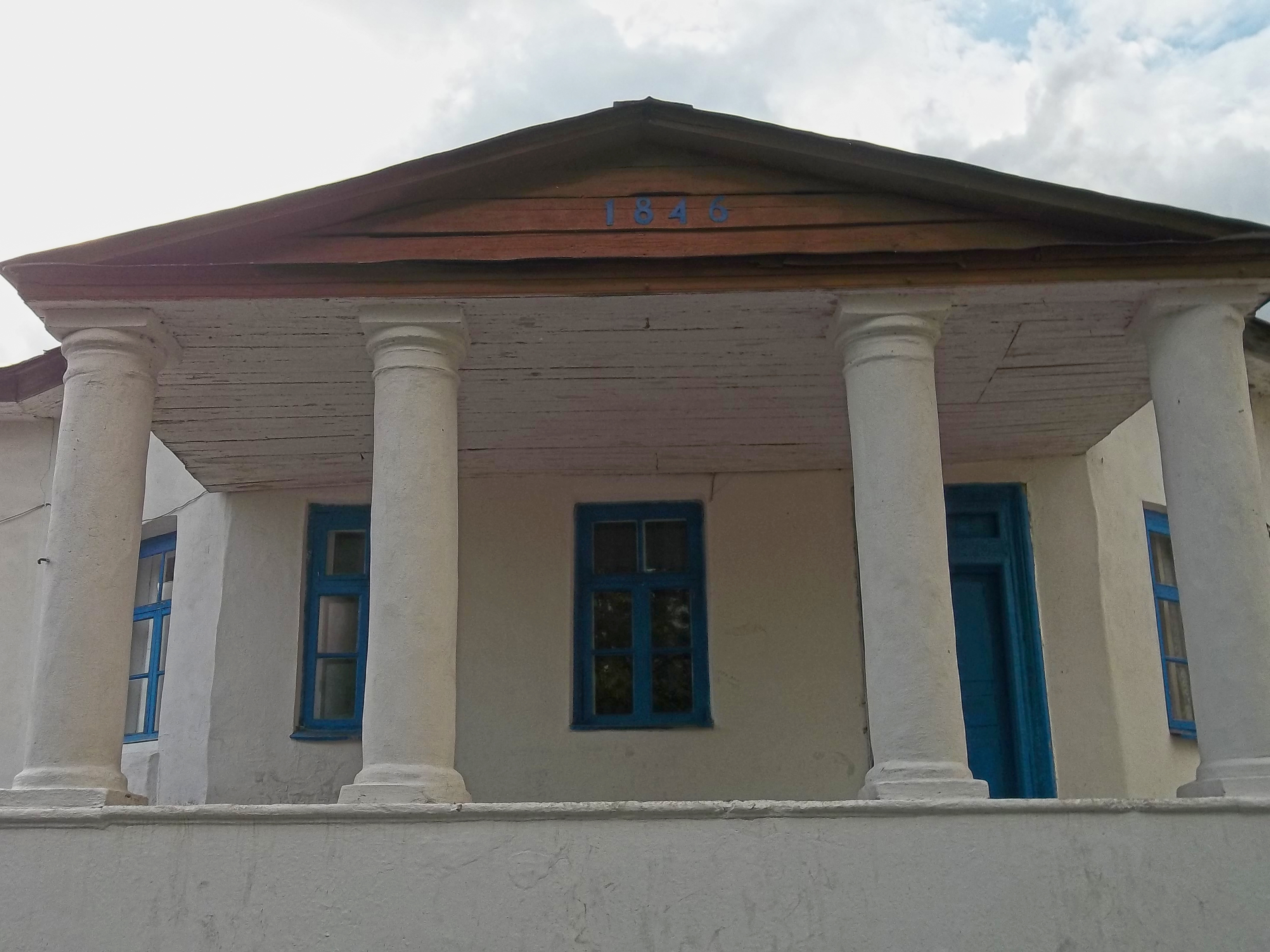 Будинок /маєток/ родини Добровольських, Кривий Ріг, село Зелене, вул. Червонофлотська, 1 (вул. Яновського), школа №101.